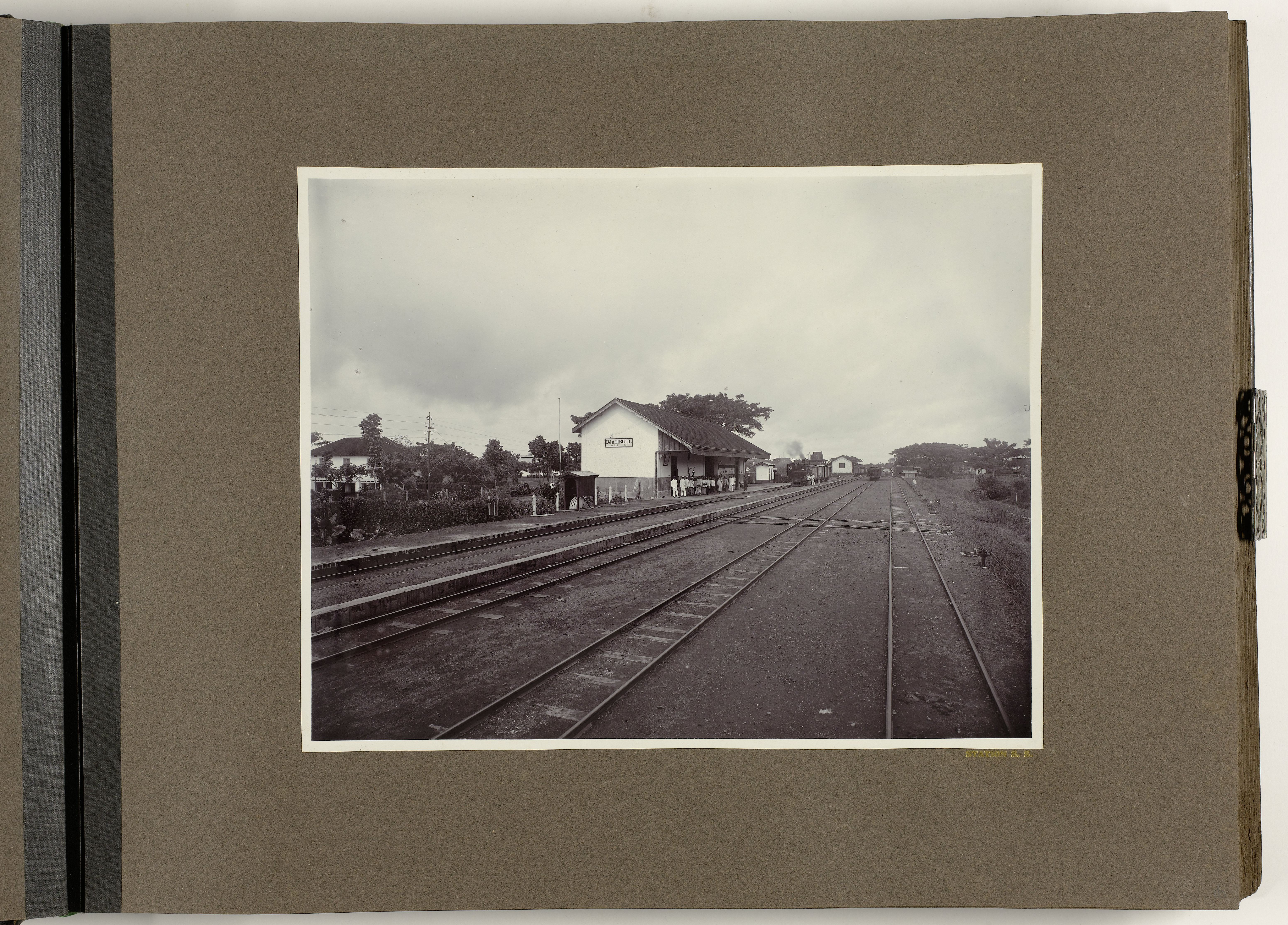 IdentificatieTitel(s): Station S. S. (titel op object)Objecttype: foto Objectnummer: NG-1987-10-A-16Opschriften / Merken: opschrift, rechtsonder, gedrukt: ‘STATION S. S.’Omschrijving: Treinstation van Djatiroto met vier spoorlijnen met op twee daarvan enkele wagons. Rechts het stationsgebouw met op het perron wachtende mensen. Onderdeel van het fotoalbum aangeboden aan F.J. Wirix door het personeel van de Suikeronderneming Djatiroto in 1917.VervaardigingVervaardiger: fotograaf: Atelier KurkdjianPlaats vervaardiging: JatirotoDatering: 1917Fysieke kenmerken: daglichtgelatinezilverdrukMateriaal: fotopapier Techniek: daglichtgelatinezilverdrukAfmetingen: h 297 mm × b 376 mmOnderwerpWanneer: 1917 - 1917Waar: JatirotoWie: F.J. WirixSuikeronderneming DjatirotoHandels Vereeniging AmsterdamVerwerving en rechtenVerwerving: aankoop 29-mei-1987Copyright: Publiek domein